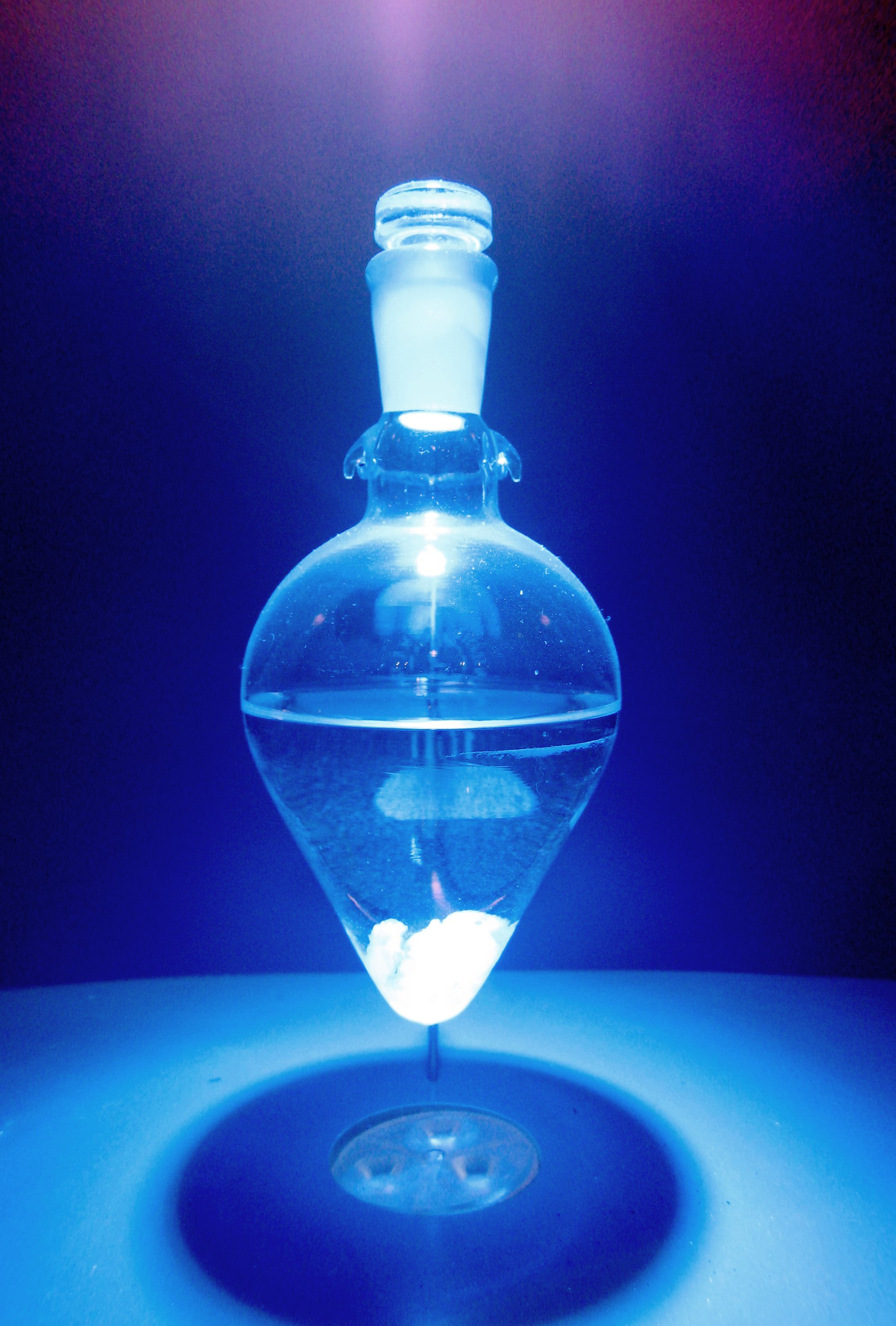 DNA im Naturkundemuseum in Berlin